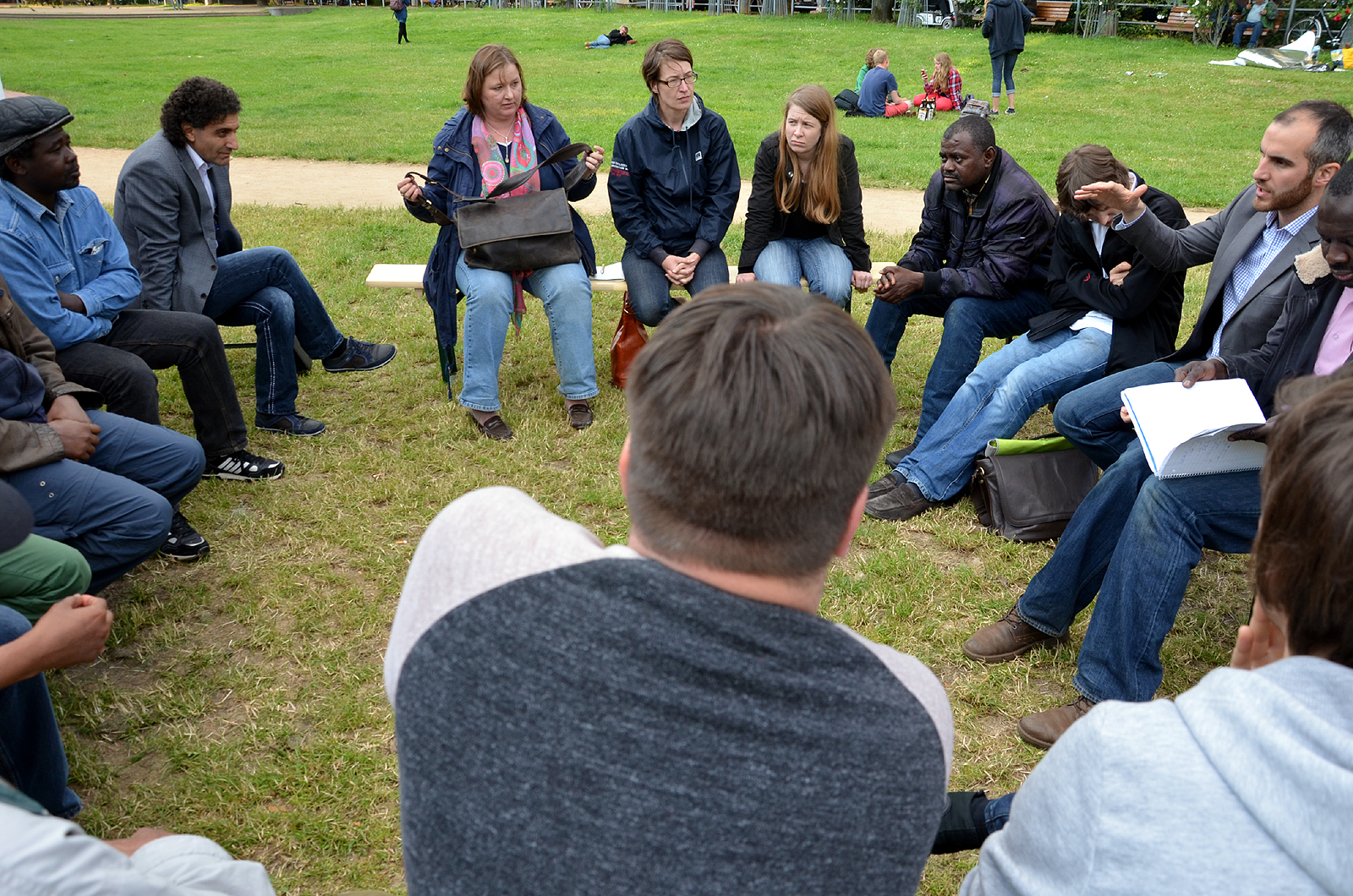 Am 24. Mai 2014 schlugen Flüchtlinge aus dem Sudan ihre Zelte auf dem Weißekreuzplatz in Hannover auf, um öffentlich sichtbar friedlich gegen ihre Abschiebung zu protestieren ...